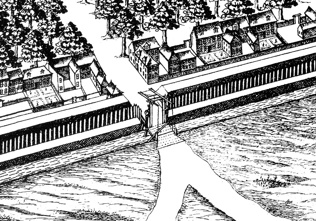 Brücke aus der Dorotheenstadt nach Süden über den Hornwerksgraben ("Potsdamer Brücke"). Ausschnitt aus